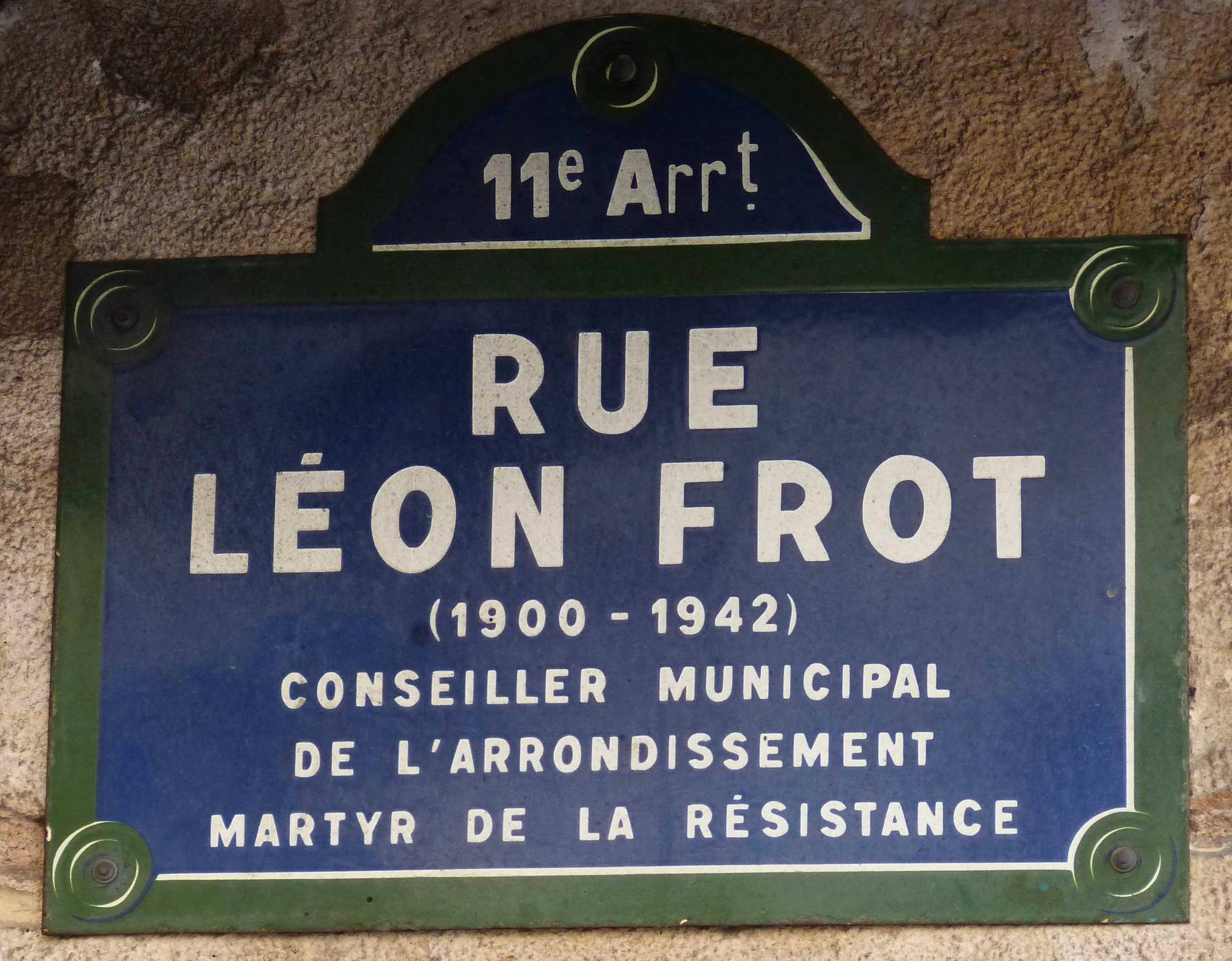 Panneau de la rue Léon-Frot à Paris 11ème, au coin de la rue Emile-Lepeu.